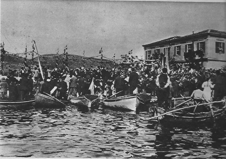 publié dans le magazine Le Miroir n°132 page 10